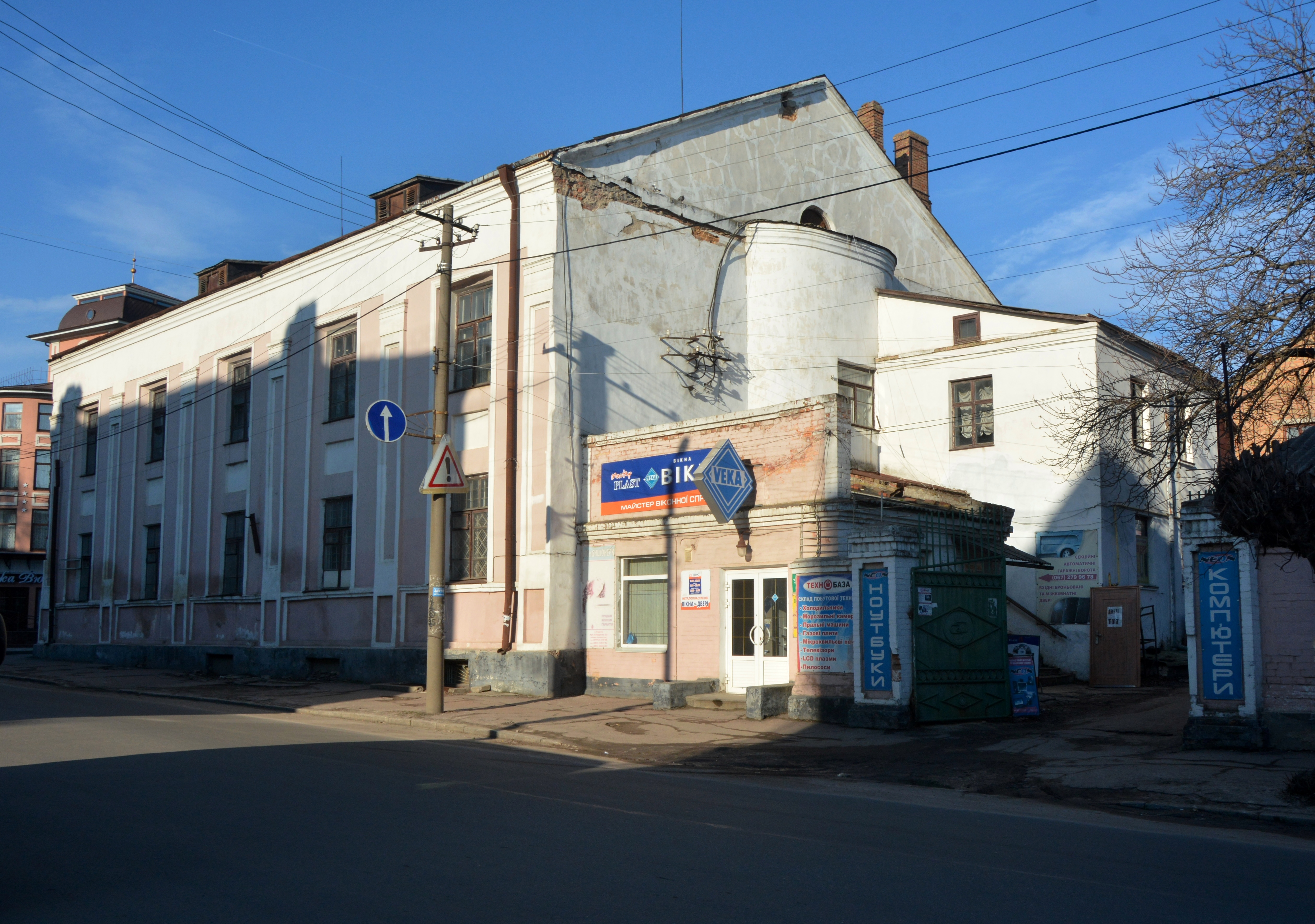 Синагога, Бердичів, вул. Вінницька, 8 (колишня вул. Свердлова, 8)